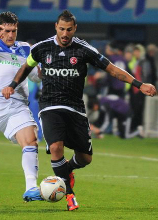 Ricardo Quaresma, Beşiktaş formasıyla Dinamo Kiev'e karşı oynarken.